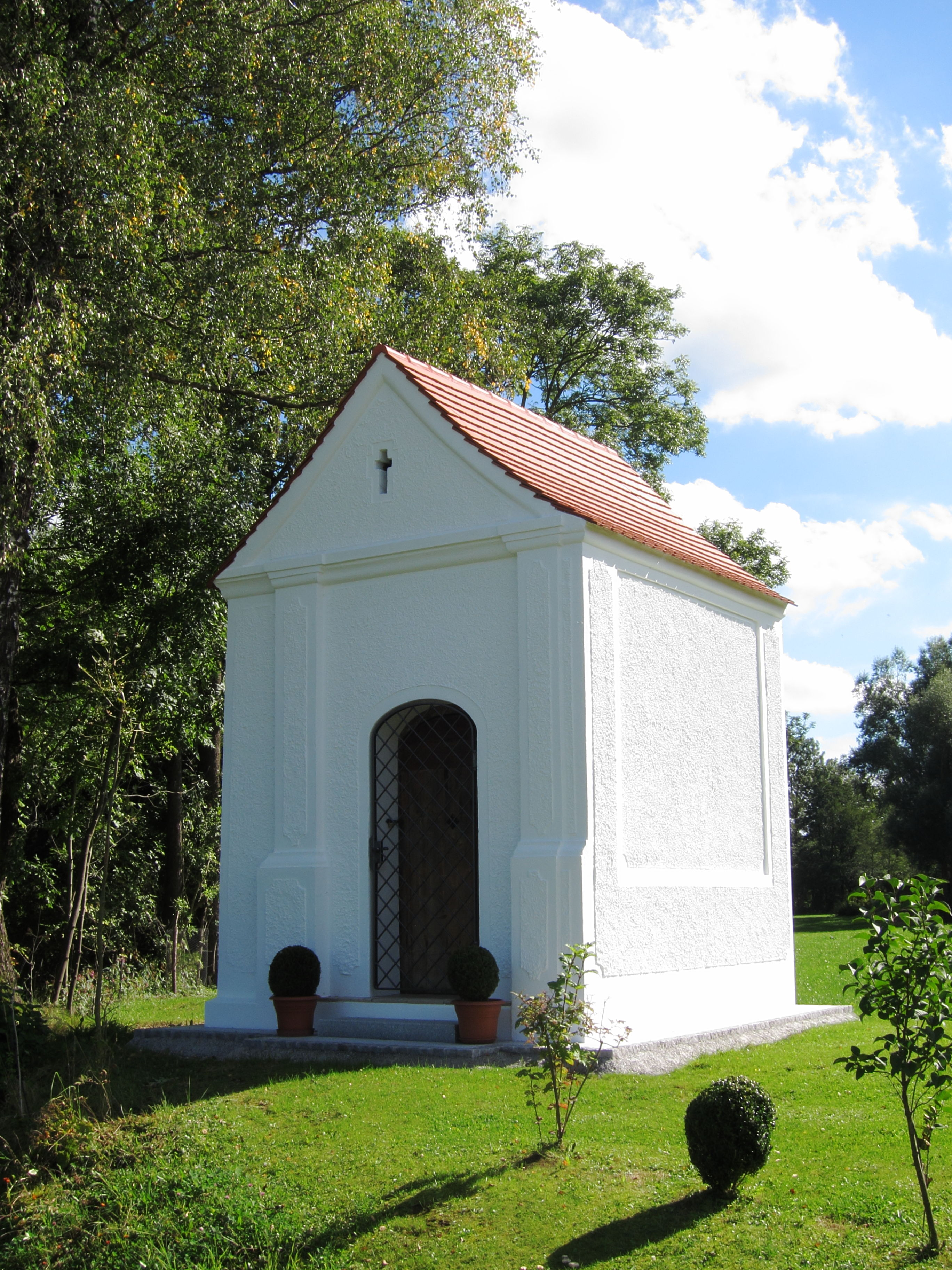 Hl. Geist-Kapelle, Satteldachbau auf quadratischem Grundriss mit Lisenengliederung, erbaut 1777; mit Ausstattung.